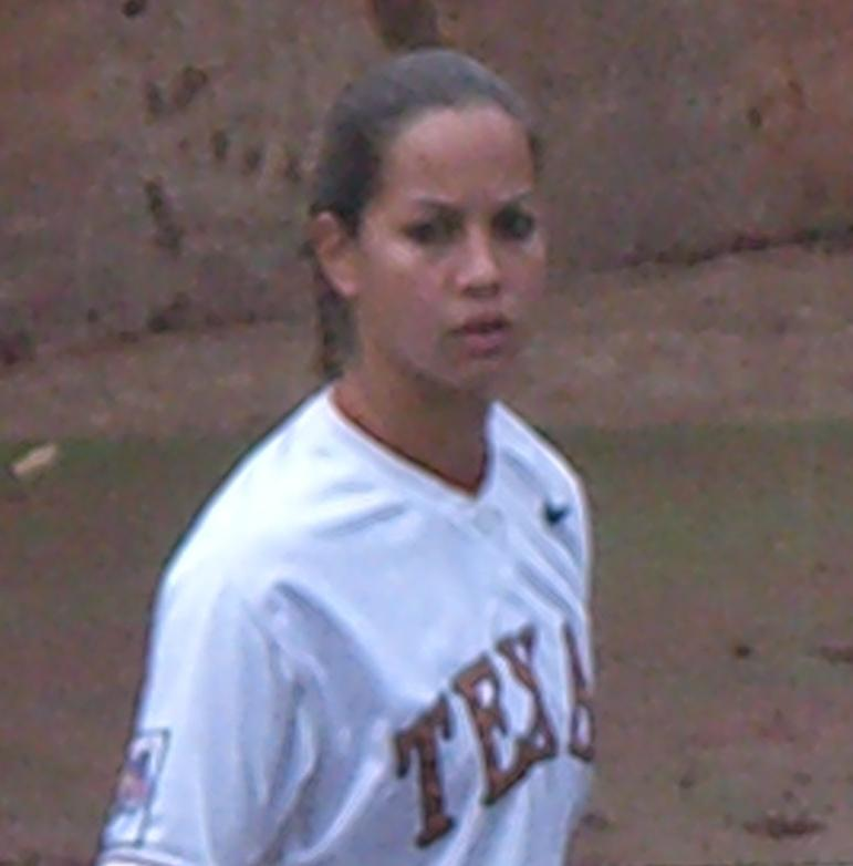 Cat Osterman